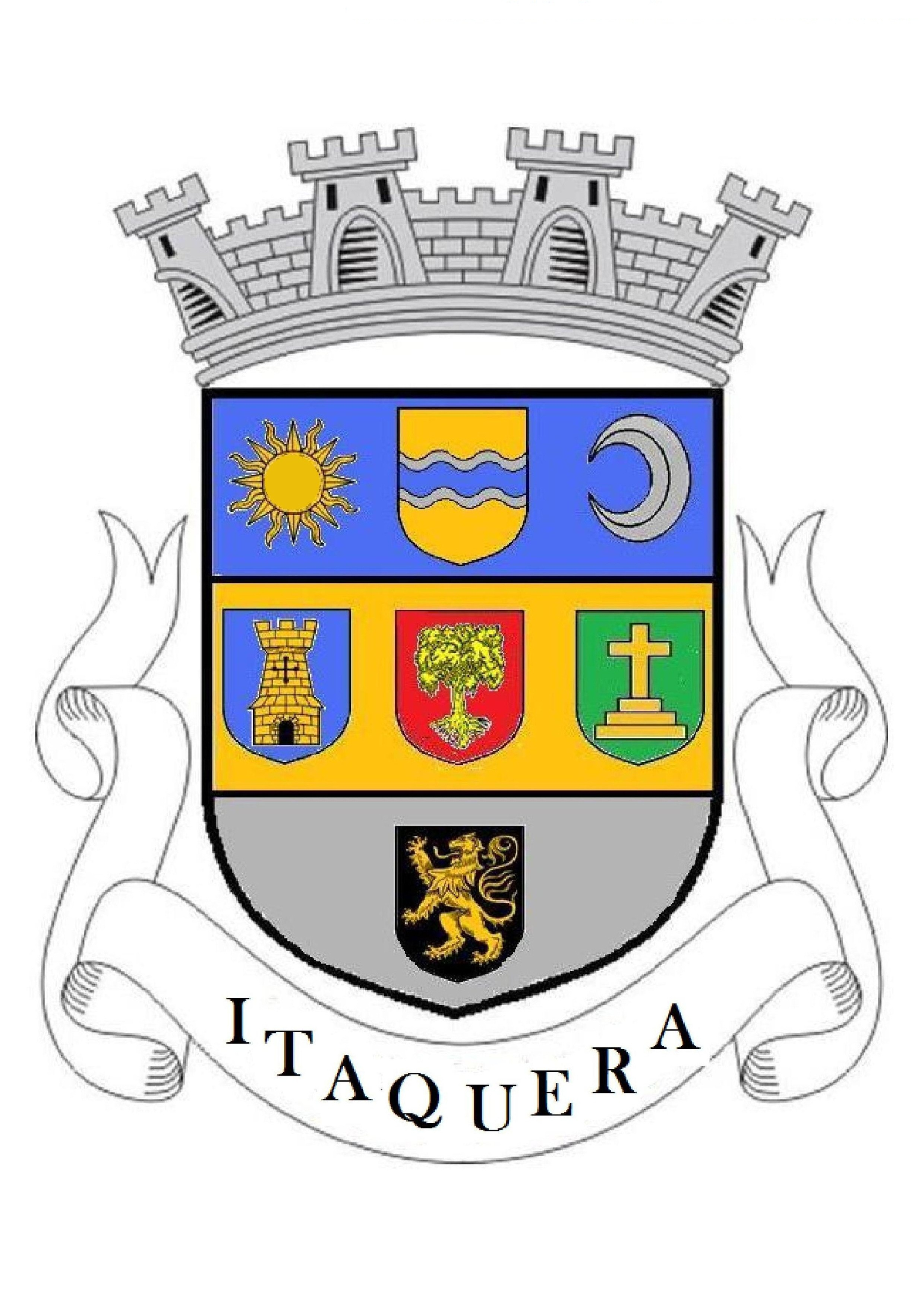 Escuso de Armas do Distrito de Itaquera, em São Paulo, Brasil.